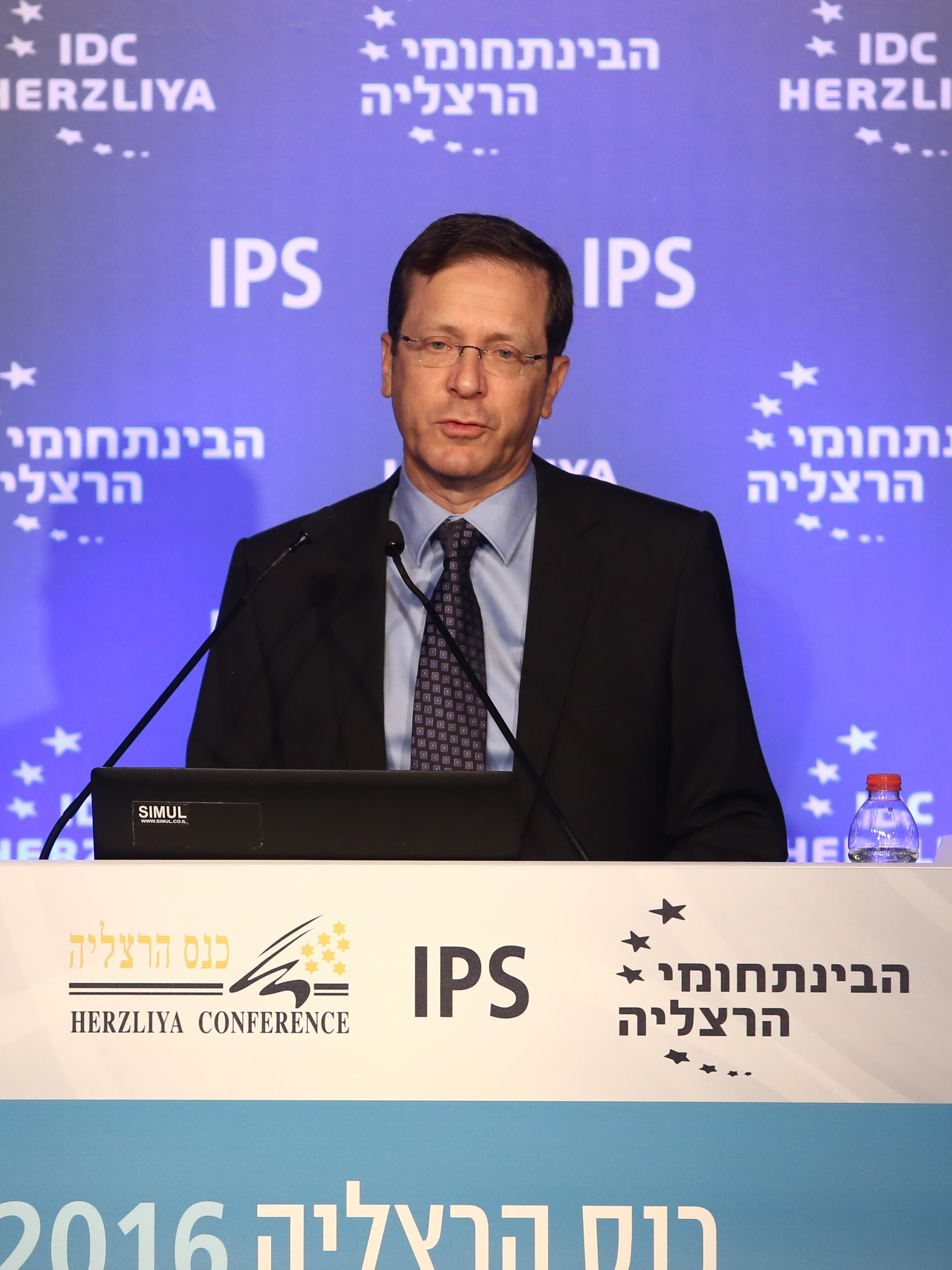 יצחק בוז'י הרצוג בכנס הרצליה 2016 של המכון למדיניות ואסטרטגיה במרכז הבינתחומי הרצליה